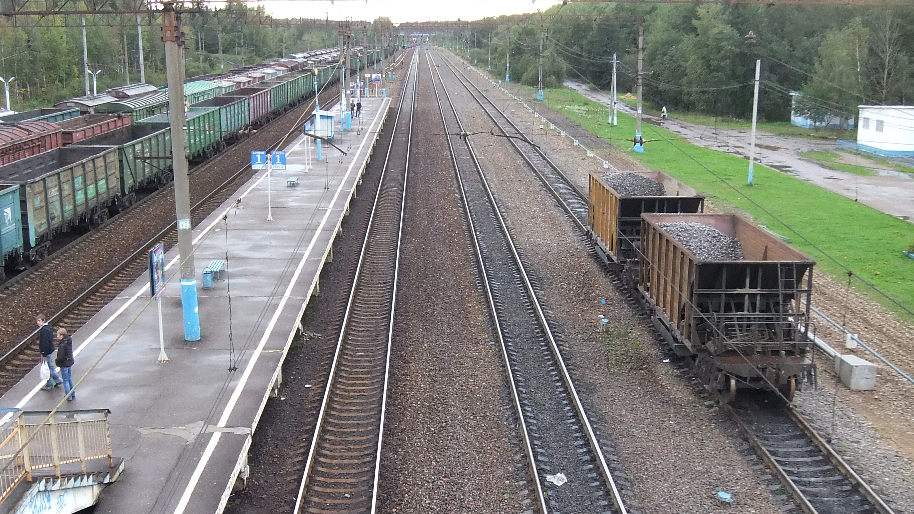 Станция Бекасово-1. Вид на восток высокой платформы.